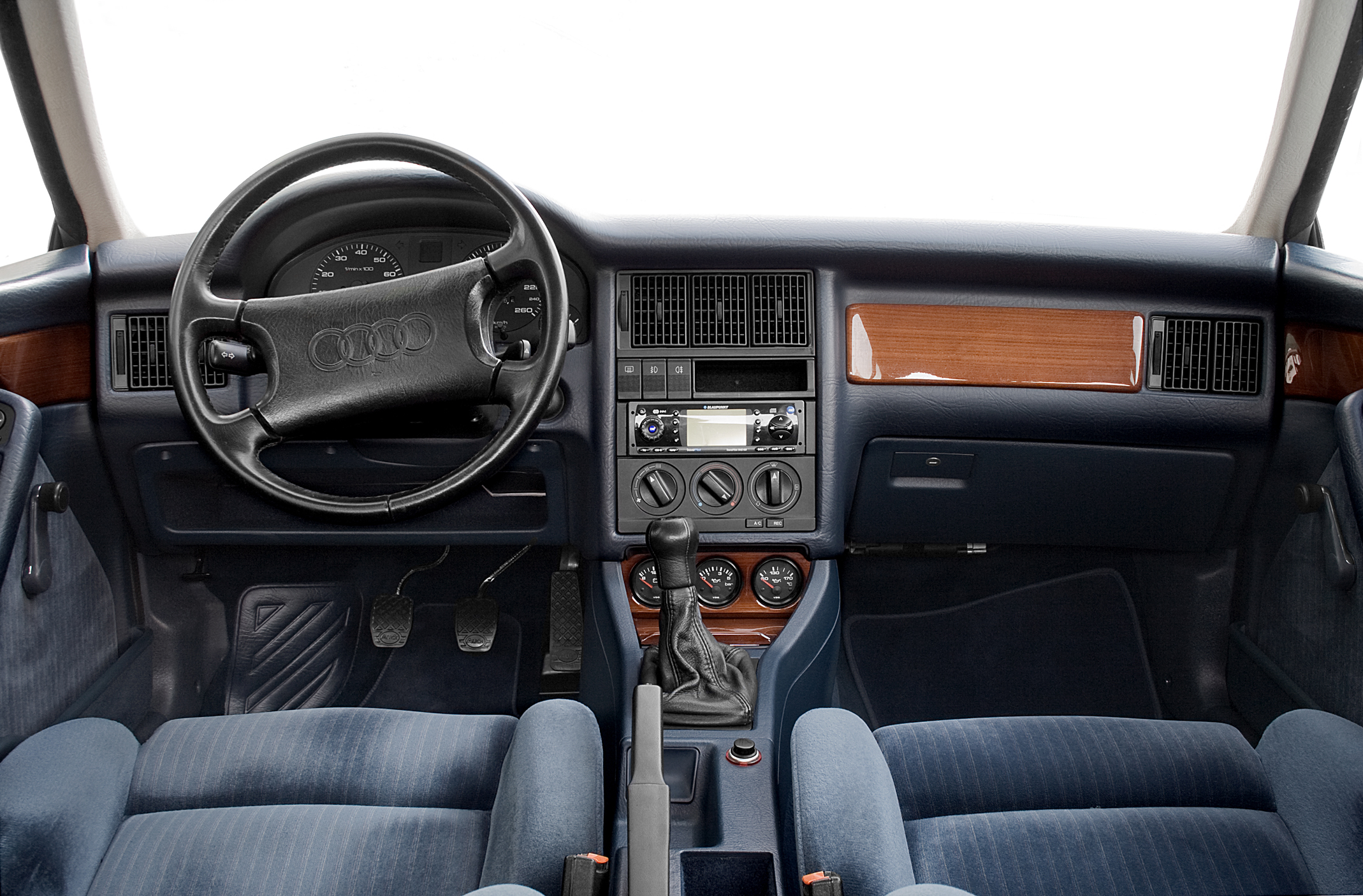 Audi Coupe 2.3E typ 89 136cv (100kw) interior Nautic Suisse